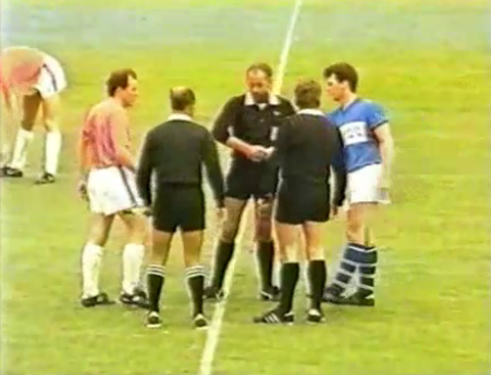 De Westland Cup finale in 1989 tegen 's-Gravenzande sv